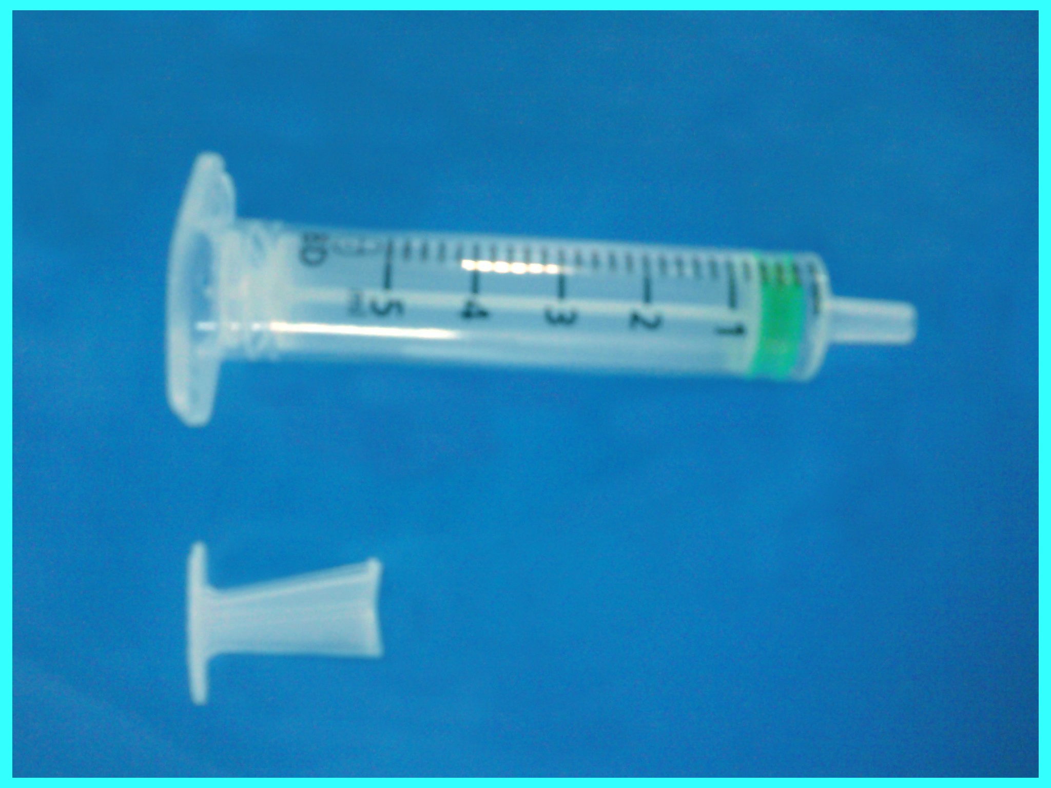 സ്വയം ഉപയോഗ ശൂന്യമാവുന്ന സിറിഞ്ച് നശിപ്പിക്കപ്പെട്ട നിലയില്‍.